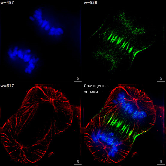 Флуоресценція поділу клітини: на фото зображено поділ людської ракової клітини. Фото зроблене через об'єктив епіфлюоресцентного мікроскопа. Клітина зафіксована і забарвлена барвниками: DAPI (ДНК підсвічена блакитним), GFP-INCENP (зеленим), тубулін (червоним кольором).